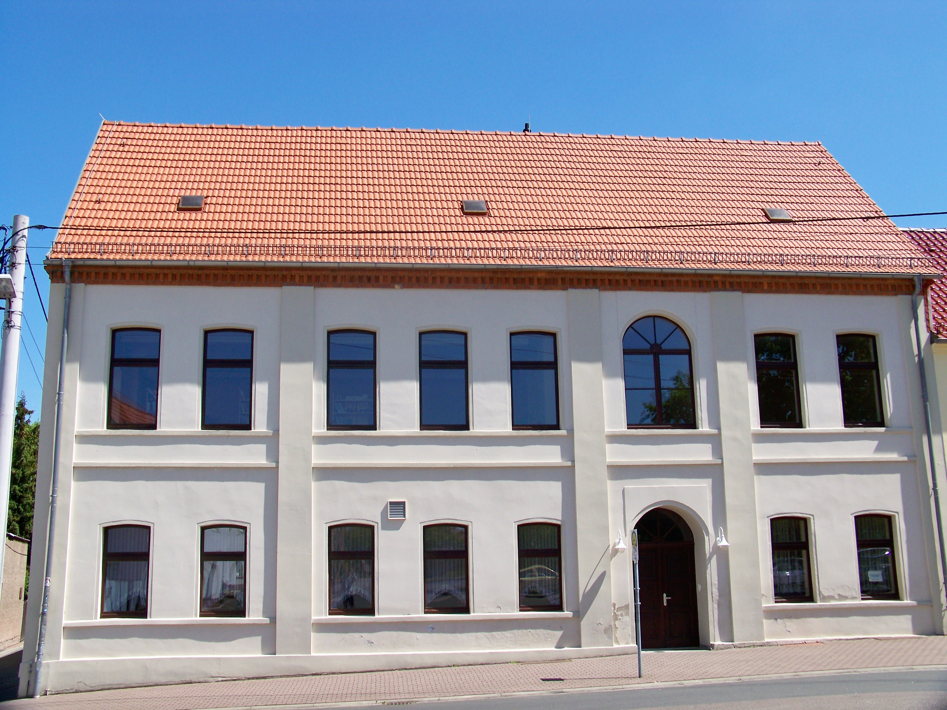 Heimatmuseum in Pouch